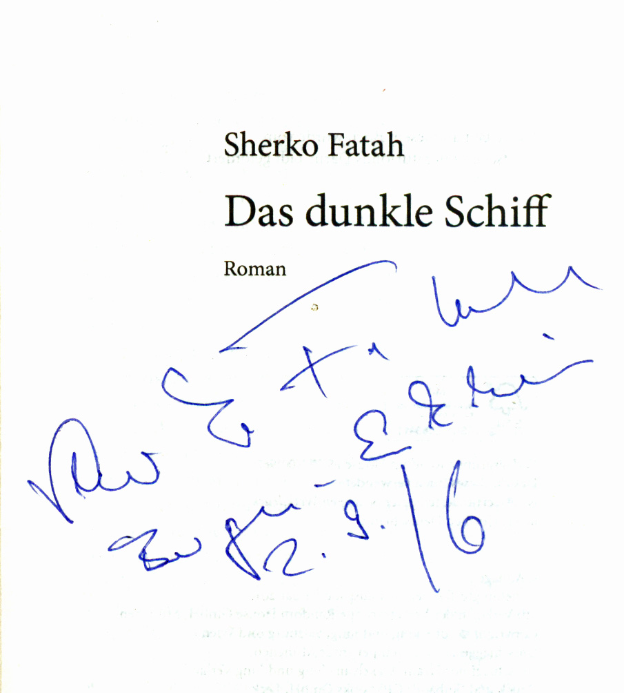 Autograph von Sherko Fatah, am 2. September 2016, beim Stadtschreiberfest in Bergen.